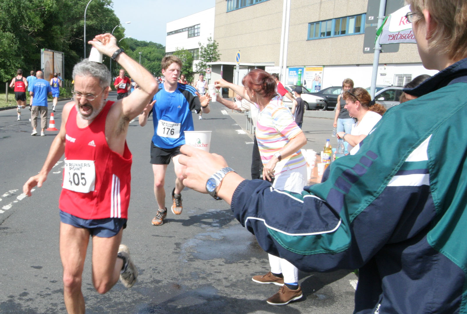 Läufer beim VOlkslauf in Bergen-Enkheim (Frankfurt am Main)